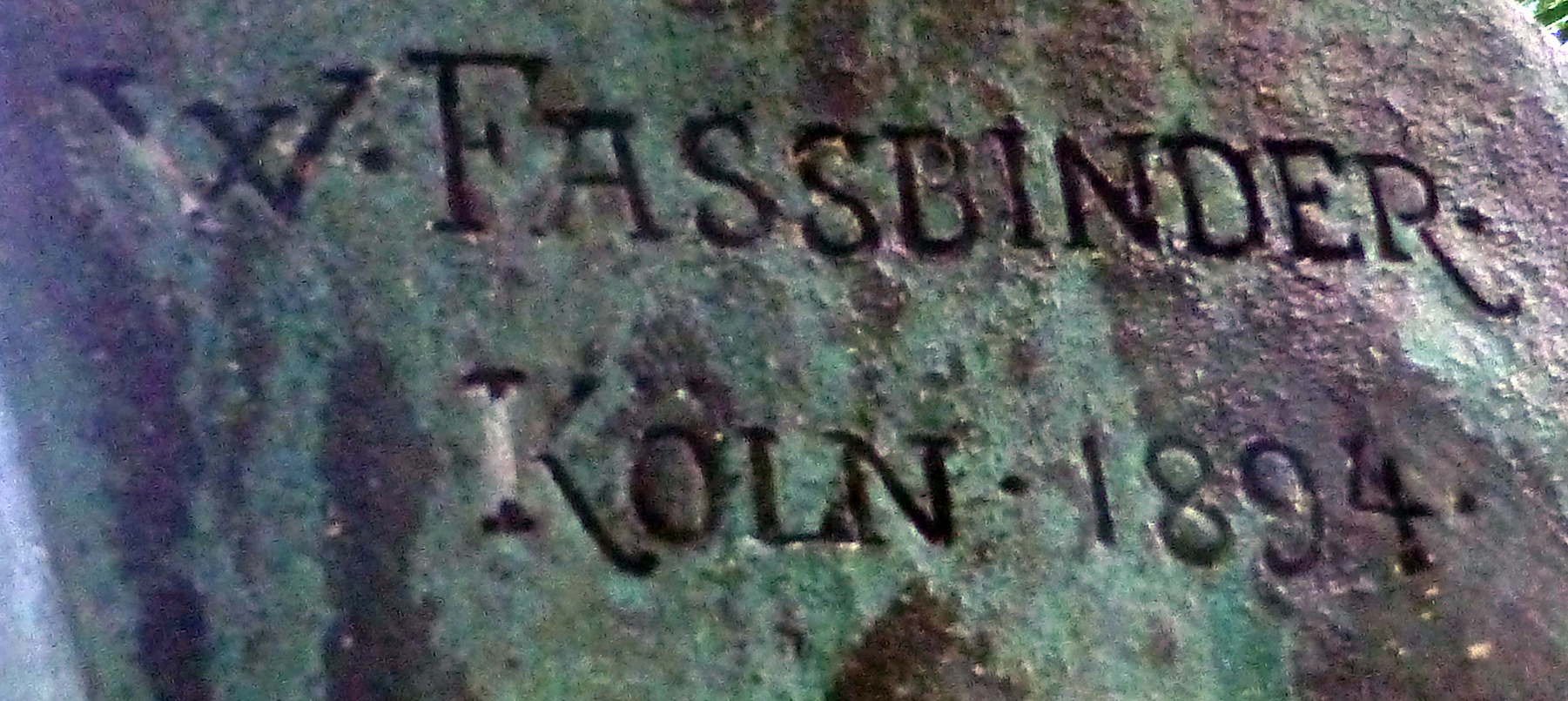 Grabmal von Gerhard Schönen auf dem Kölner Melaten-Friedhof. Signatur Künstler/Bildhauer: Wilhelm Fassbinder 1894.